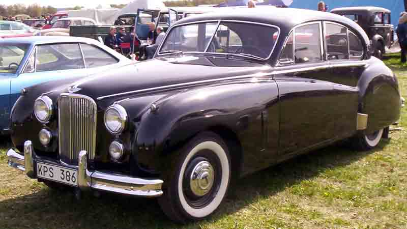 Jaguar Mark VII 4-Door Saloon 1954